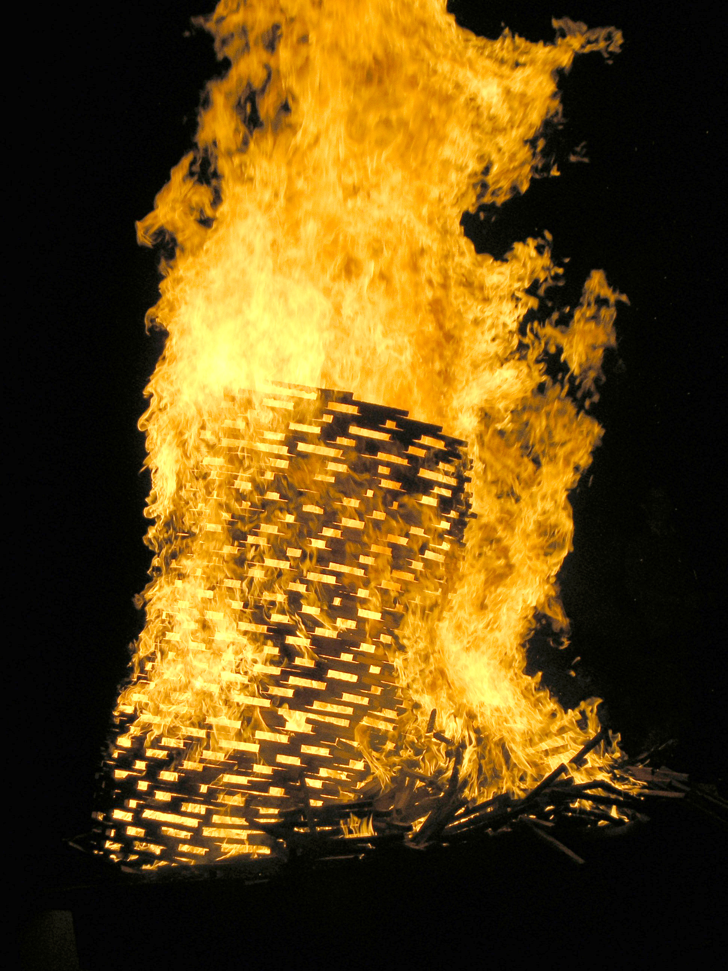 Brennender Fragmentierter Baum, Baumskulptur Dimension variabel (ca. 4m) Konstruktion Buchenholz, Unikat; Beni Altmüller